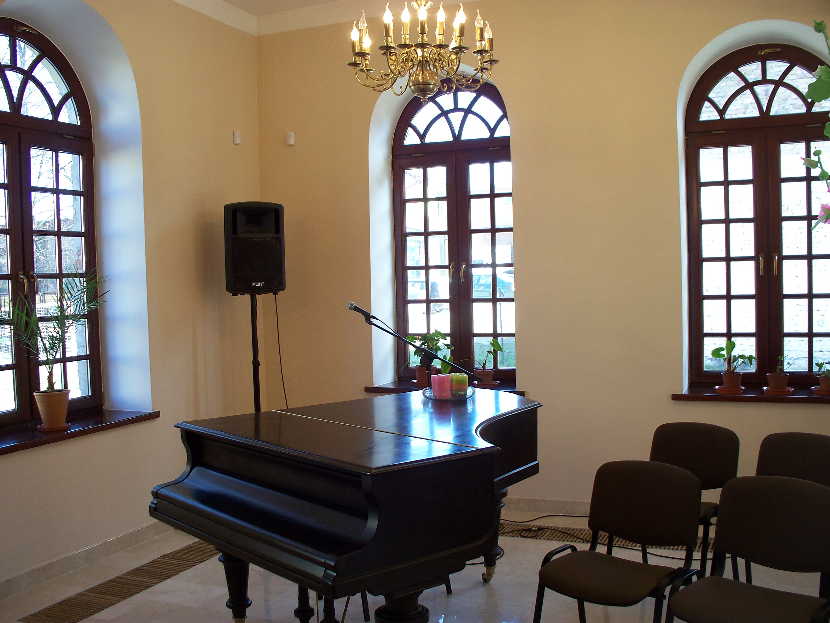 Jest to wnętrze budynku Ciechanowieckiego Ośrodka Kultury i Sportu przy ul. Mostowej 6.